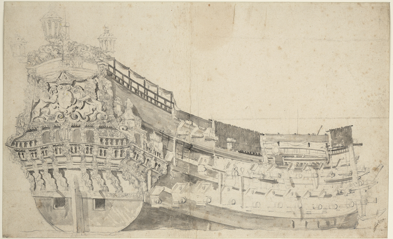 Zeichnung der Brederode ca. 1658? durch Willem van de Velde d. Ä.